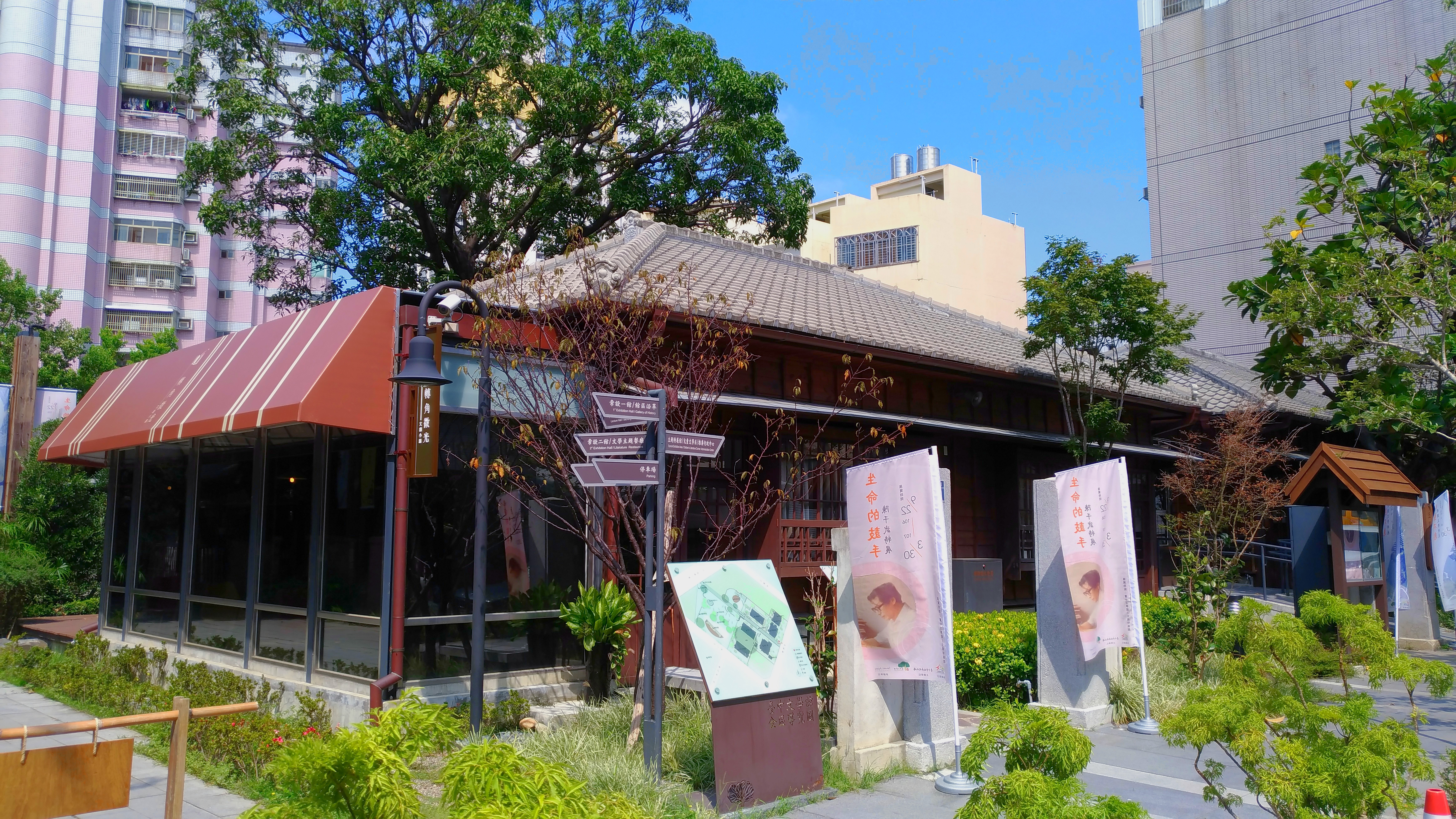 臺中文學館主題展示館